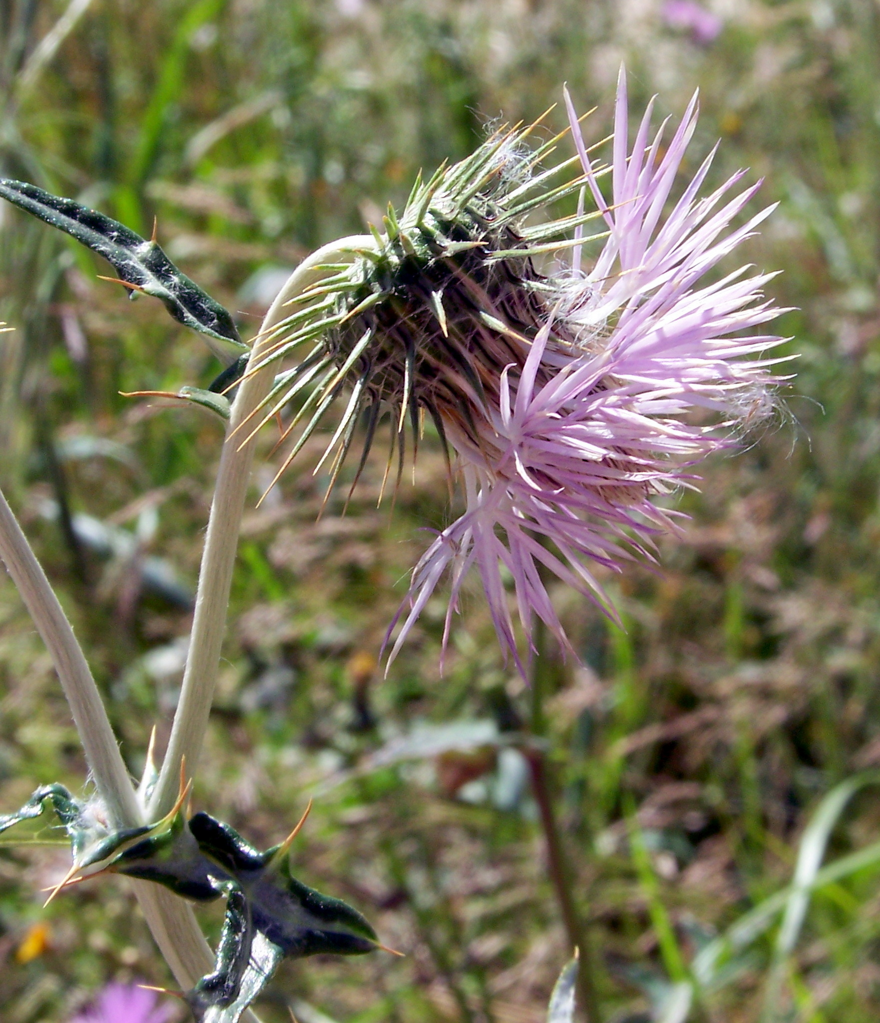 Galactites tomentosa : Inflorescencia deflexa - Colonia Ilicitina, Albatera (Provincia de Alicante, España).